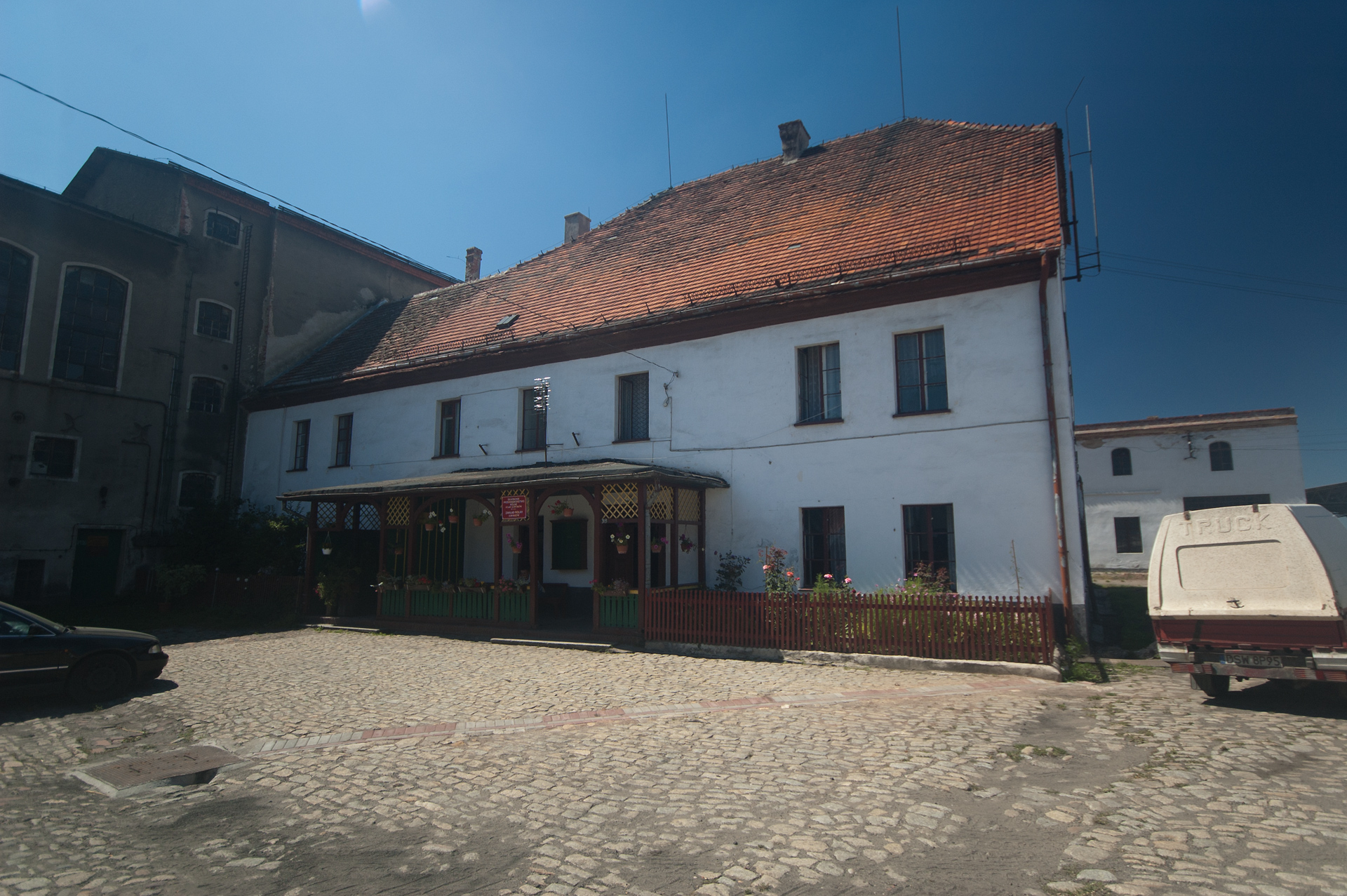 Zawiszów 3a - budynek administracyjny